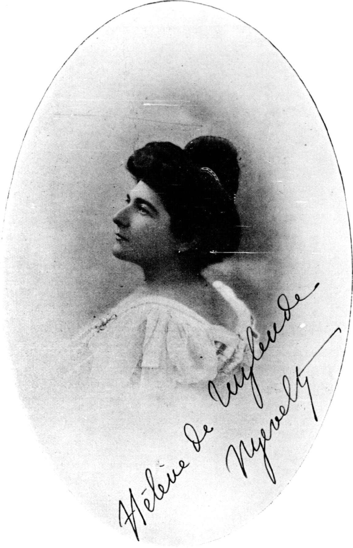 French authoress Hélène de Zuylen de Nyevelt de Haar (née Rotschild) (1863-1934)